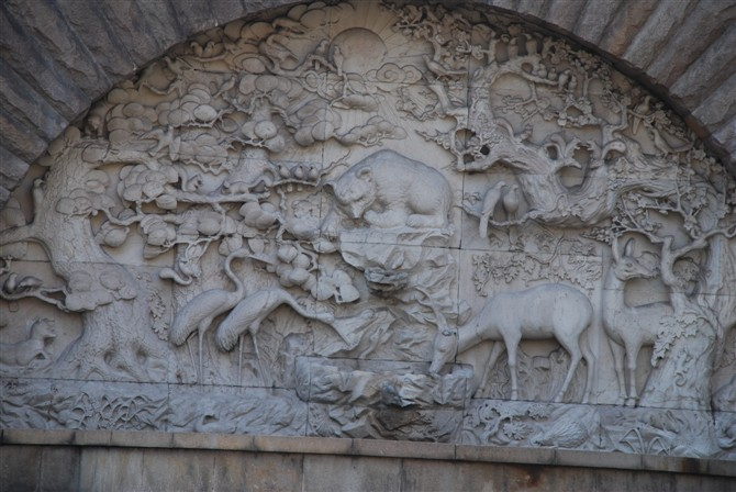 上海展览馆